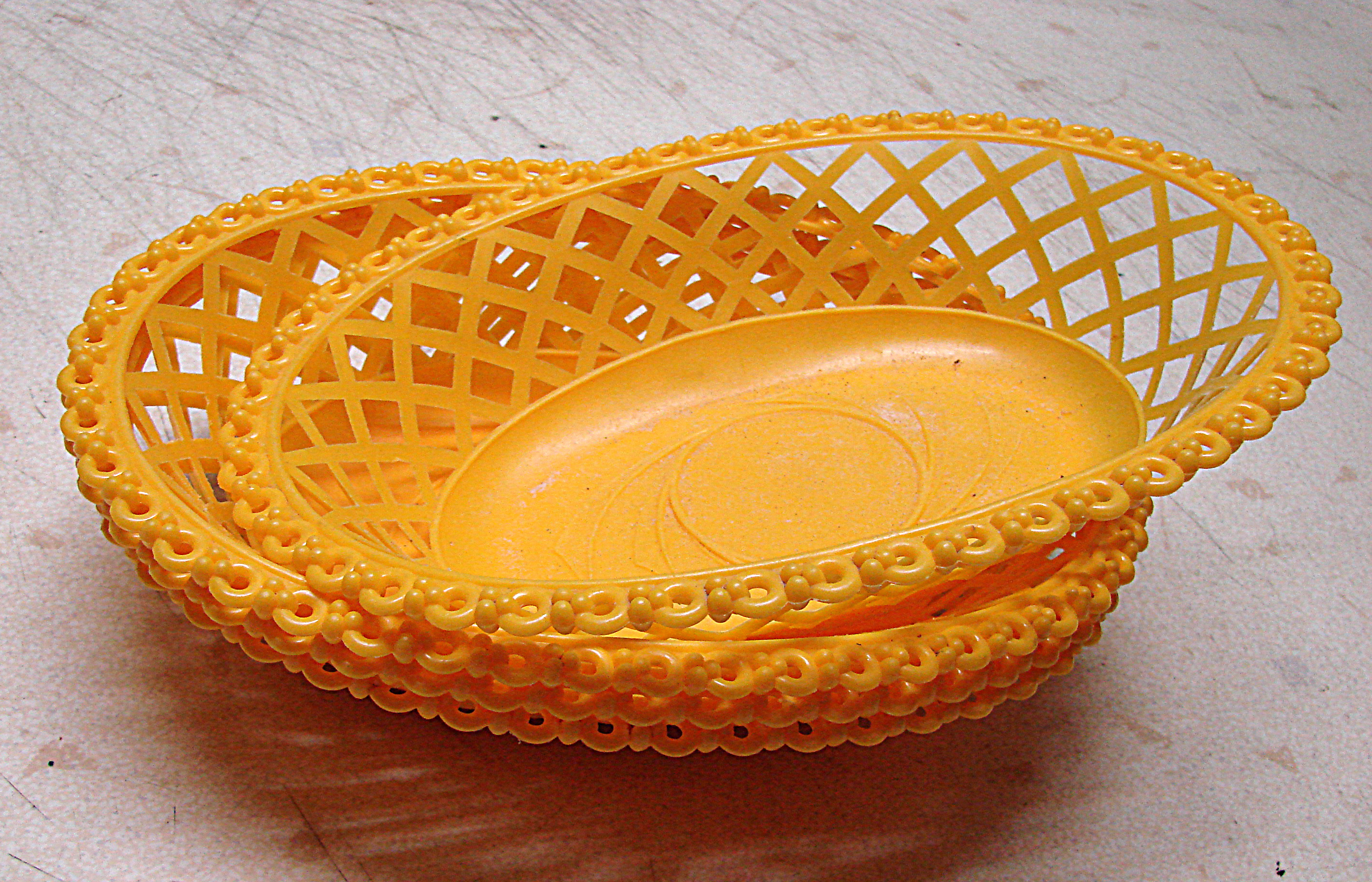 Panière